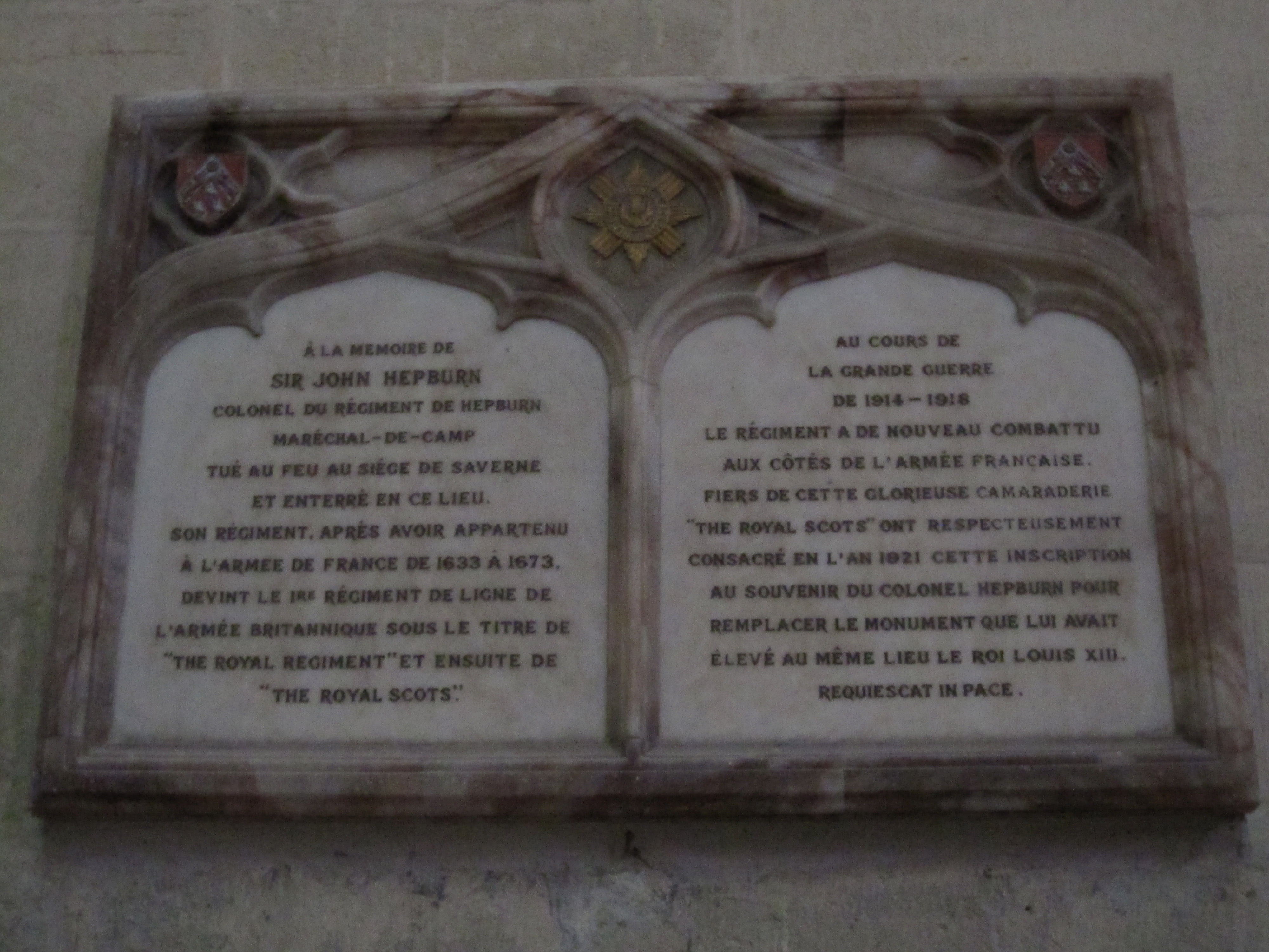 Plaque en mémoire de John Hepburn, cathédrale de Toul. "À la mémoire de Sir John Hepburn maréchal-de-camp tué au feu au siege de Saverne et enterré en ce lieu. Son régiment, après avoir appartenu à l'armée de France de 1633 à 1673, devint le 1er regiment de ligne de l'armée britannique sous le titre de "The Royal Regiment" et ensuite de "The Royal Scots". Au cours de la grande guerre de 1914-1918 le régiment a de nouveau combattu aux côtés de l'armée française. Fiers de cette glorieuse camaraderie "The Royal Scots" ont respectueusement consacré en l'an 1921 cette inscription au souvenir du colonel Hepburn pour remplacer le monument que lui avait élevé au meme lieu le roi Louis XIII. Requiescat in pace." .